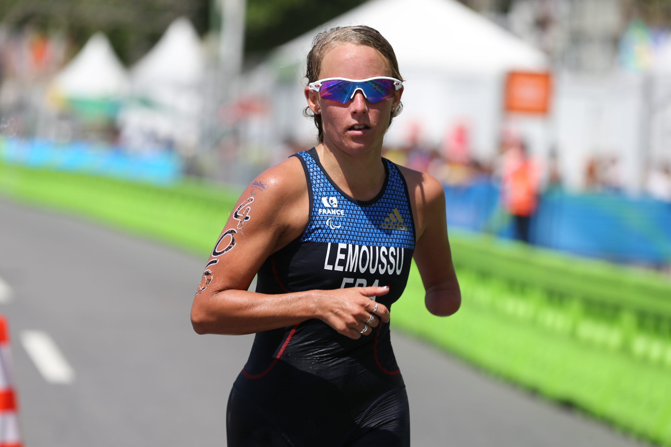 Rio de Janeiro - Provas de triatlo feminino PT4, PT2 e PT5, em Copacabana. Competição da categoria PT5. (Tânia Rêgo/Agência Brasil)